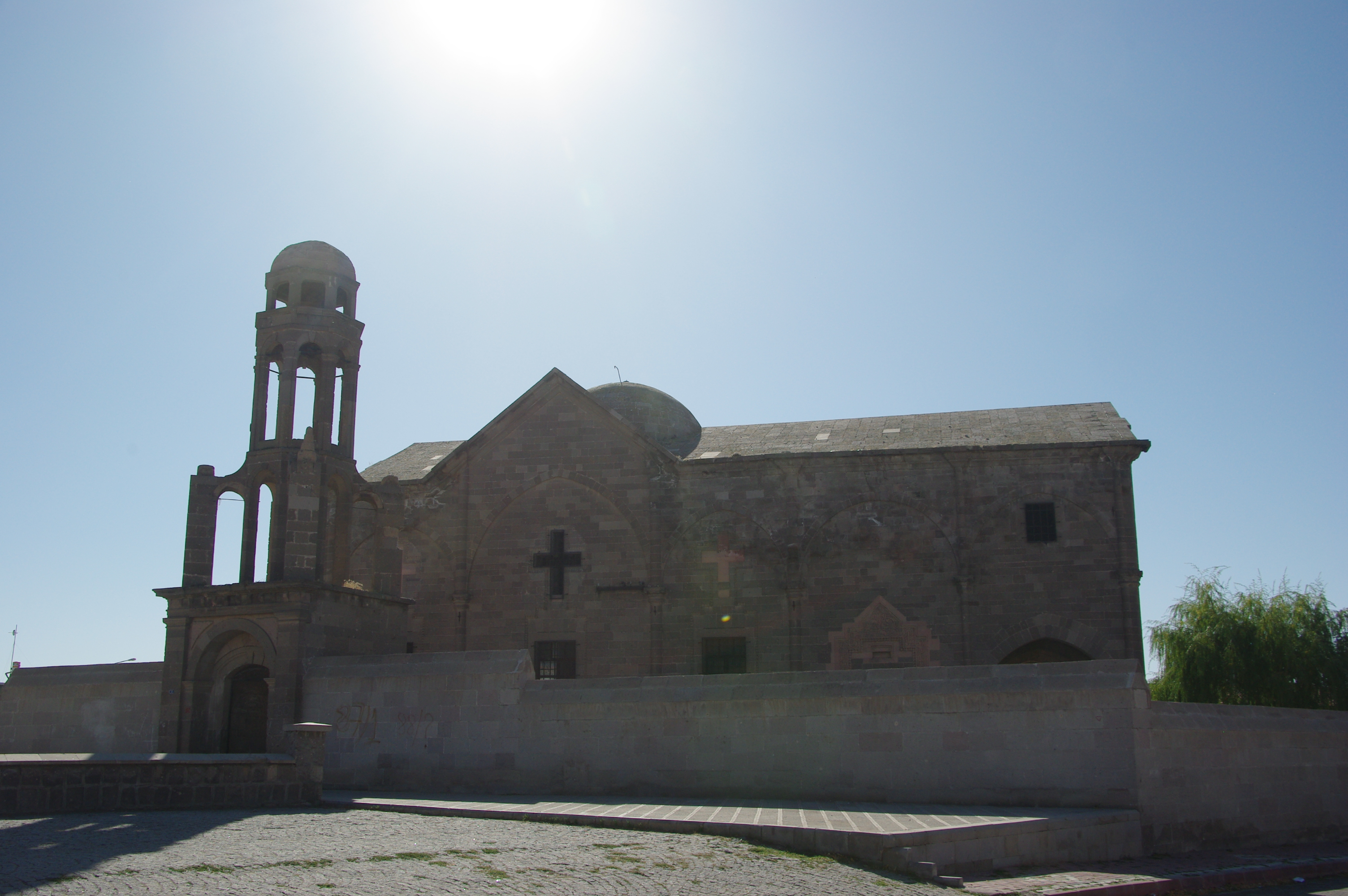 Derinkuyu, Turkey 2009-10-16